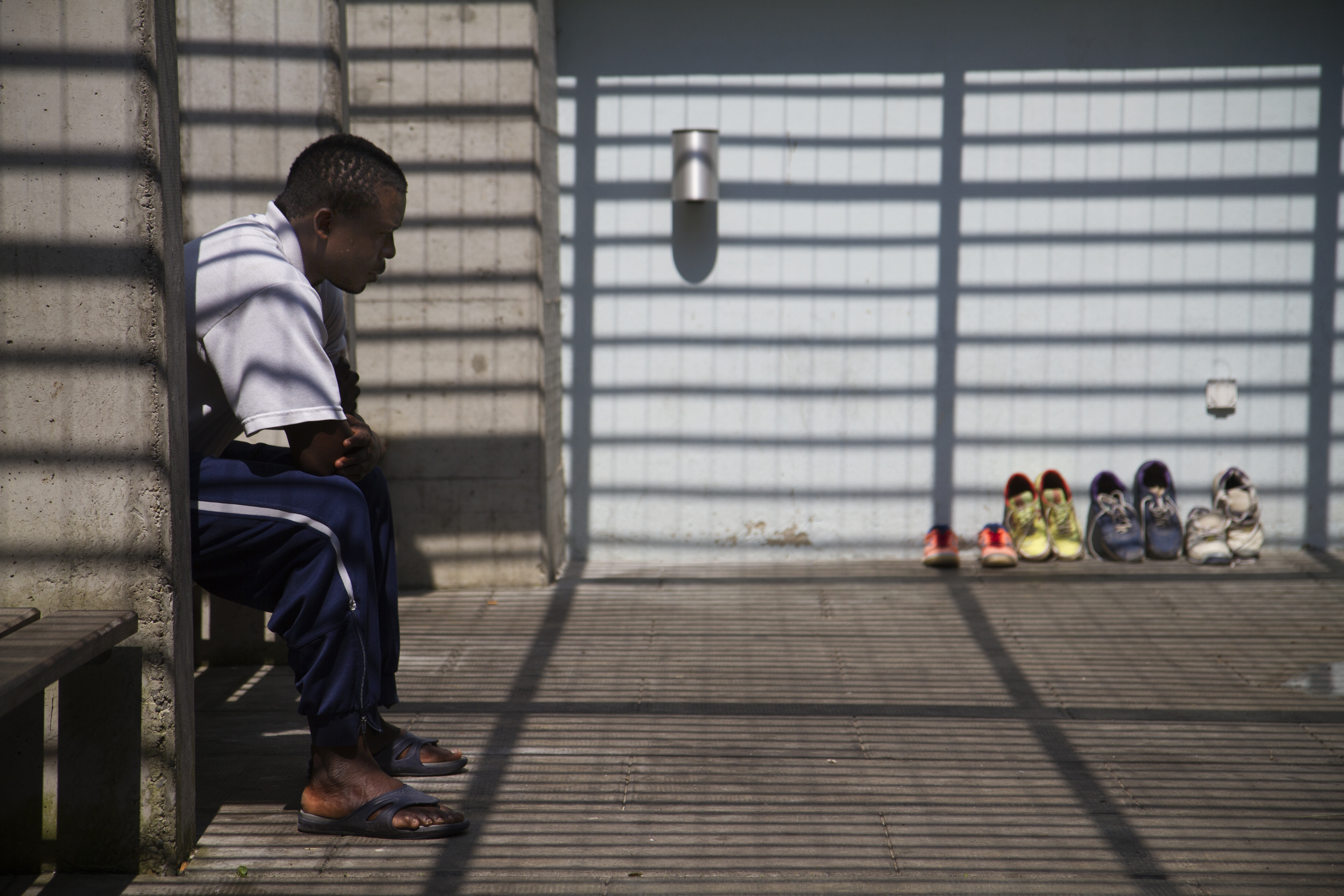 Alain, protagoniste du film « Vol Spécial » de Fernand Melgar, dans la cour de la prison de Frambois à Genève.